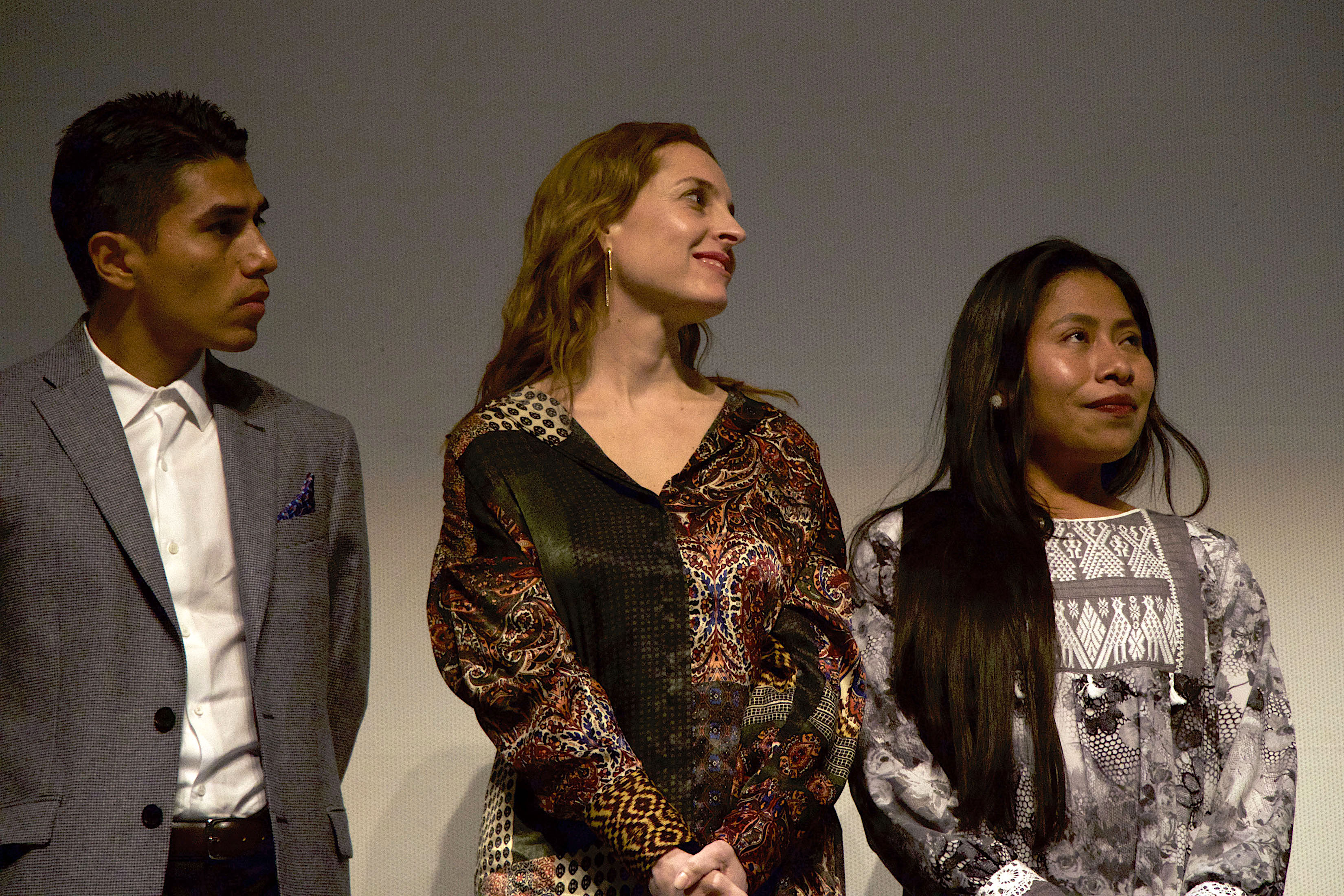 Jueves 13 de diciembre de 2018. En el Teatro de la Ciudad Esperanza Iris, se proyectó la película Roma, del director Alfonso Cuarón, que contó con la presencia José Alfonso Suárez del Real, secretario de Cultura de la Ciudad de México; Eugenio Caballero, director de arte; Yalitza Aparicio, Marina de Tavira protagonistas del film; así como personajes del electo y producción. Fotografía: Milton Martínez / Secretaría de Cultura de la Ciudad de México.